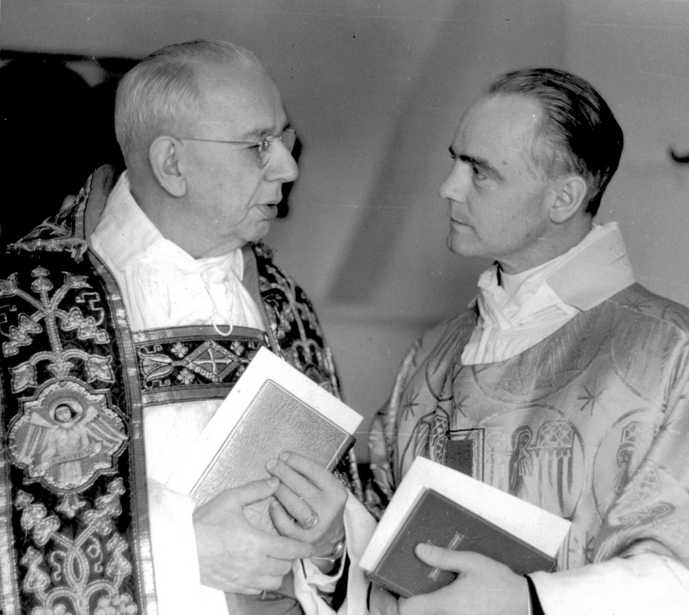 Bromma församlings nye kyrkoherde Bengt Collste installerades på söndagen i sitt ämbete av pastor primarius Olle Nystedt i Bromma medeltida och nyligen restaurerade kyrka, som var fullsatt till sista plats. Kyrkoherde Bengt Collste är den är den förste kyrkoherden i den nybildade församlingen och ser på bilden tillsammans med pastor primarius.